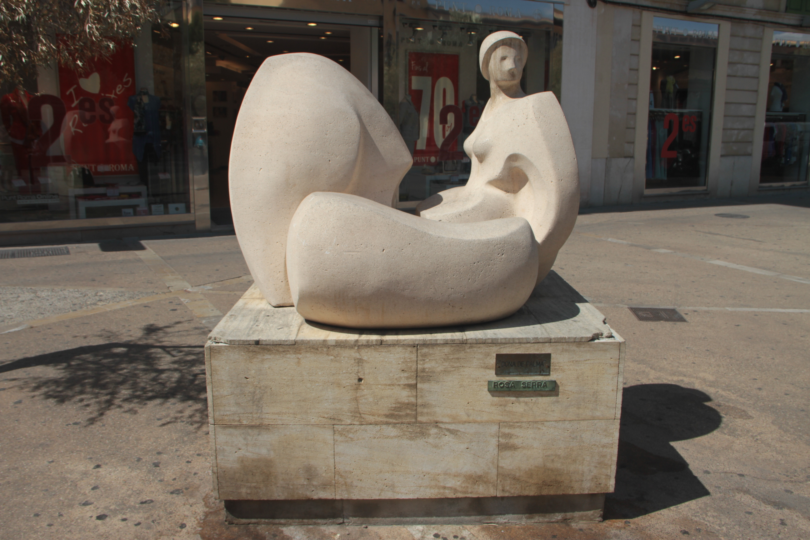 Жінка Пальми (1992), скульптор Роза Серра, площа Олівара. Пальма, Мальорка. Іспанія